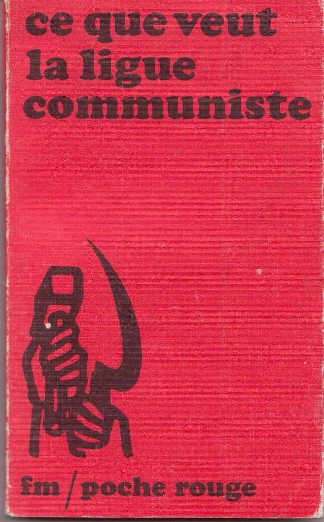 Couverture du livre "ce que veut la ligue communiste"